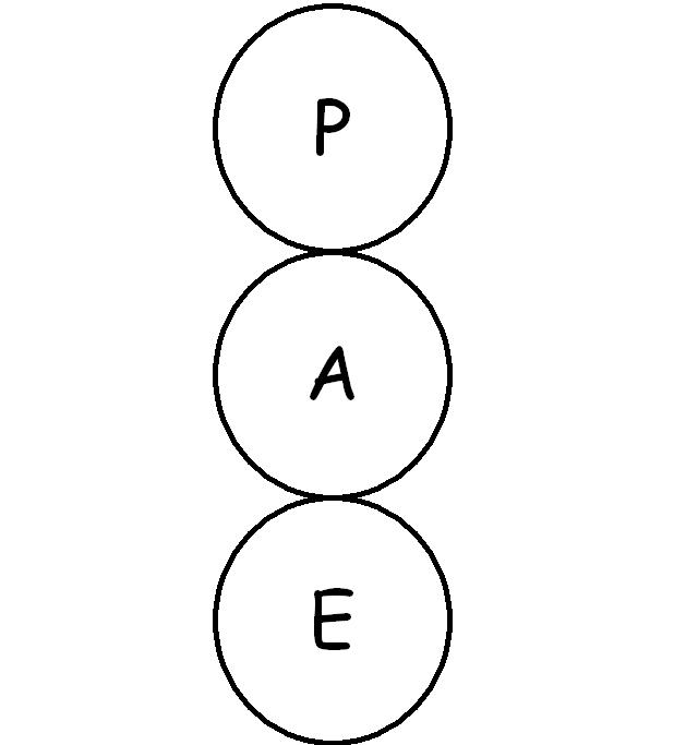 Psychologie / Analyse Transactionnelle / analyse structurale de niveau 1 / Etats du Moi Licensing Catégorie:image de psychologie